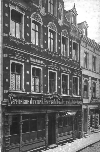 Frohnhauser Straße 19 und 21 in Essen um 1910